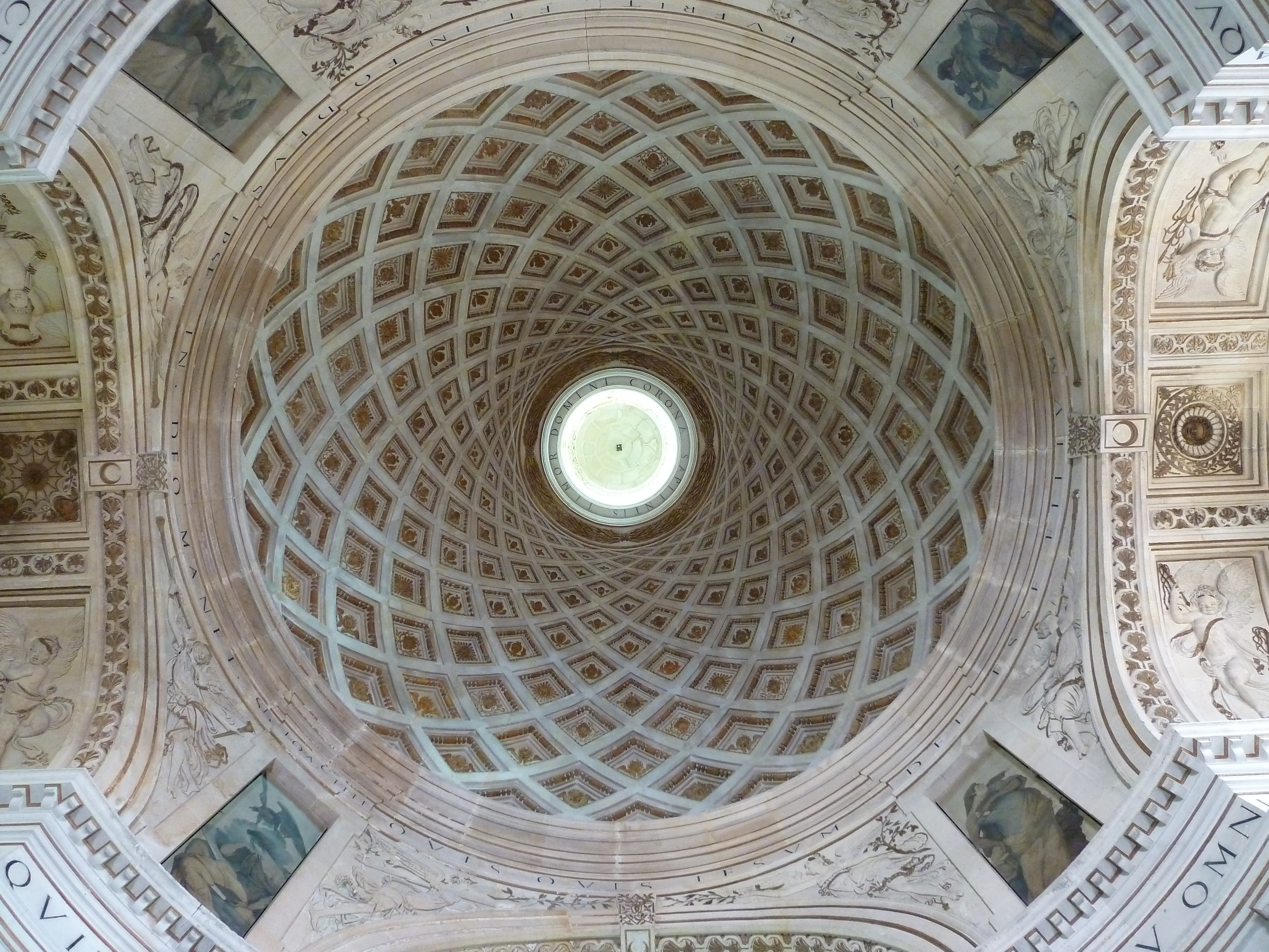 Château d'Anet - Anet - Eure-et-Loir - France - Mérimée PA00096955 .